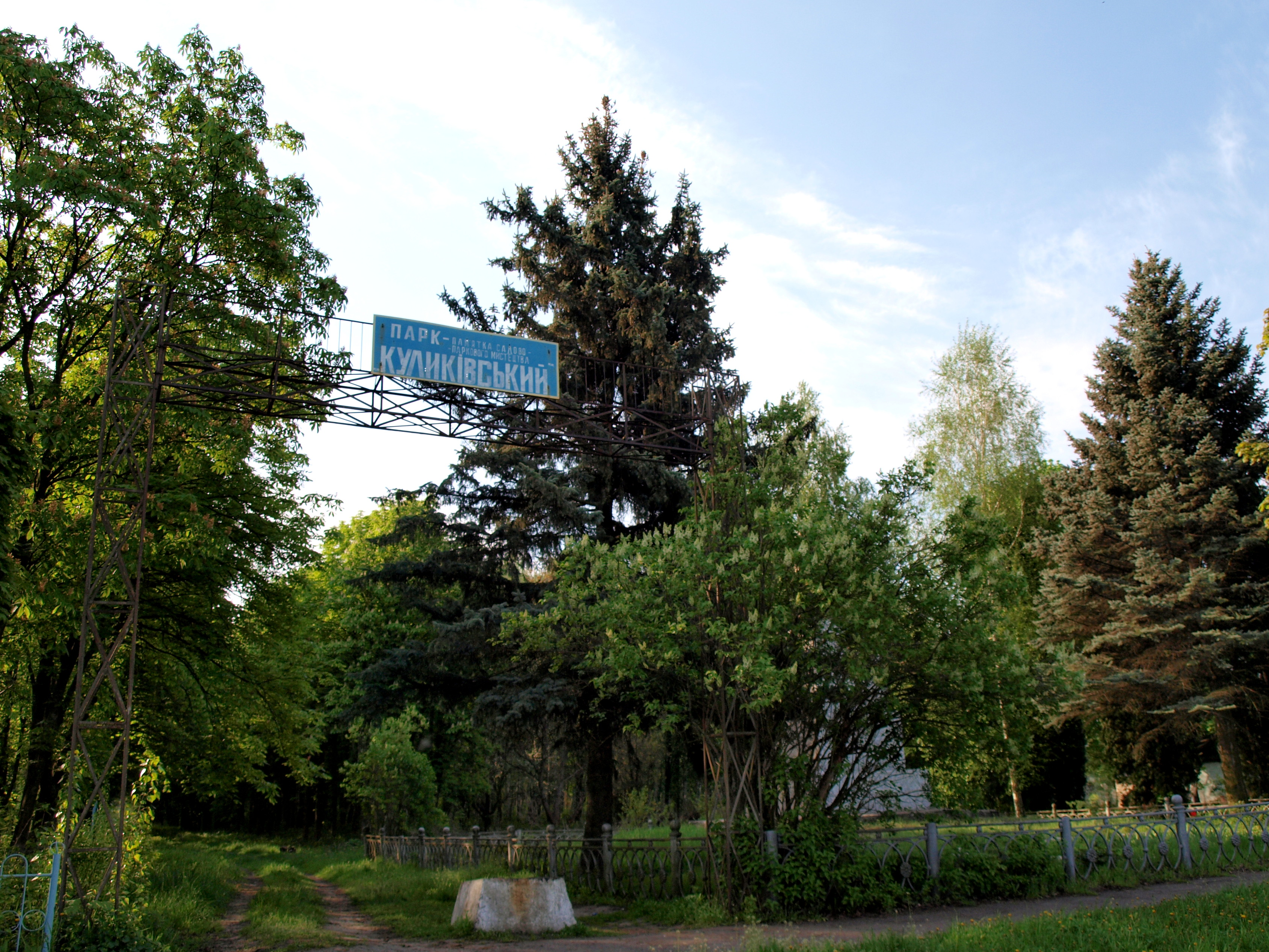 Куликівський парк, с.Куликове, Полтавський р-н, Полтавська обл.